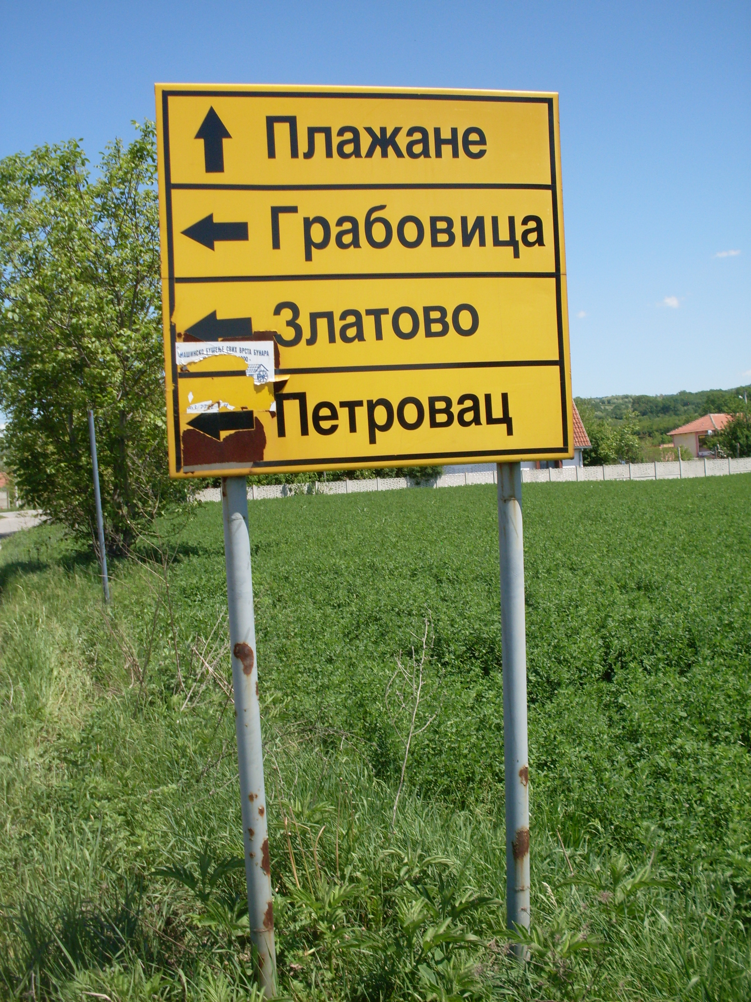 Ulaz u Plazane selo Nadomak Despotovca